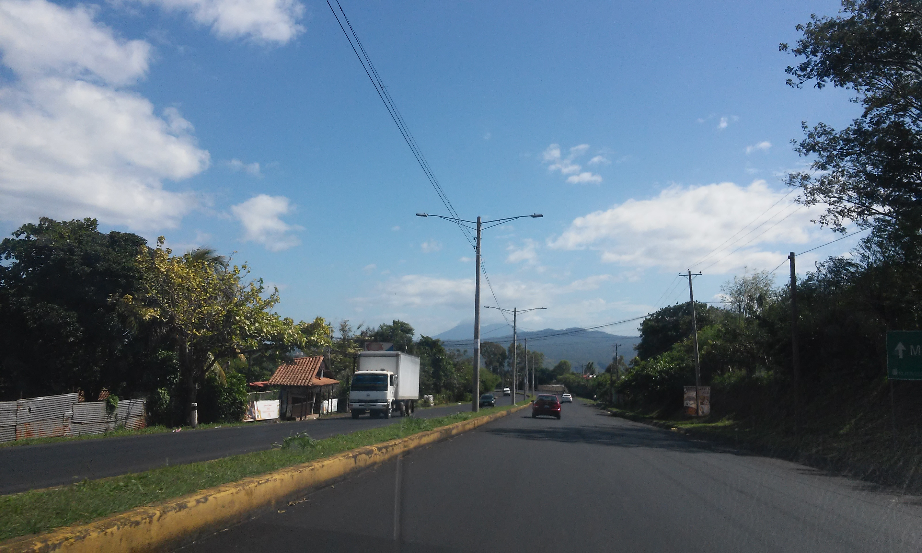 La Carretera a Masaya, es una autopista que atraviesa el centro de Managua, en Nicaragua y termina en el municipio homónimo.